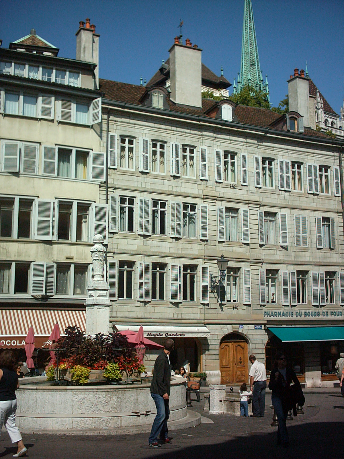 Place du Bourg-de-Four de Genève (Suisse)